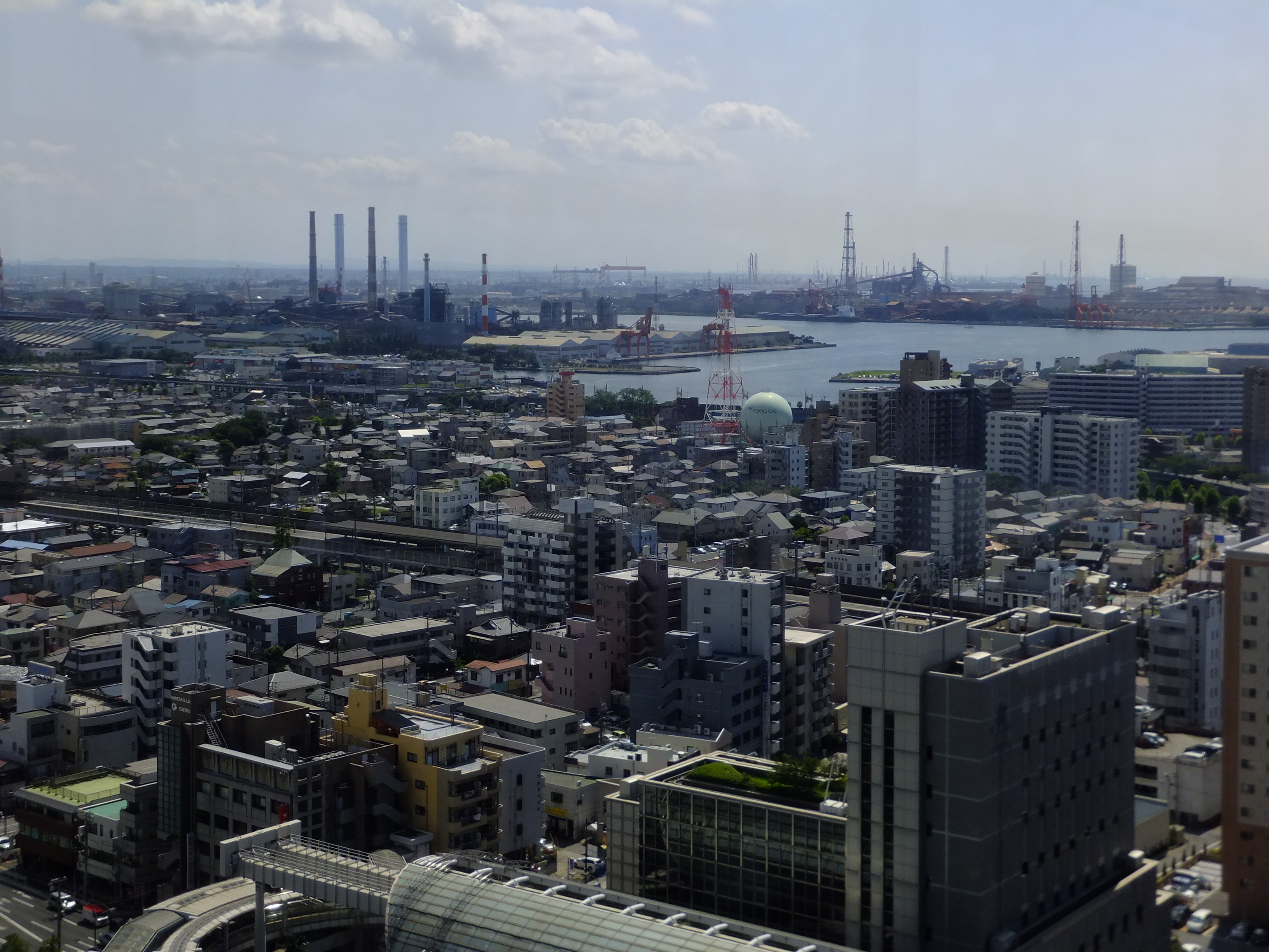 千葉県庁本庁舎からの眺め、本千葉駅・JFEスチール千葉製鉄所方向